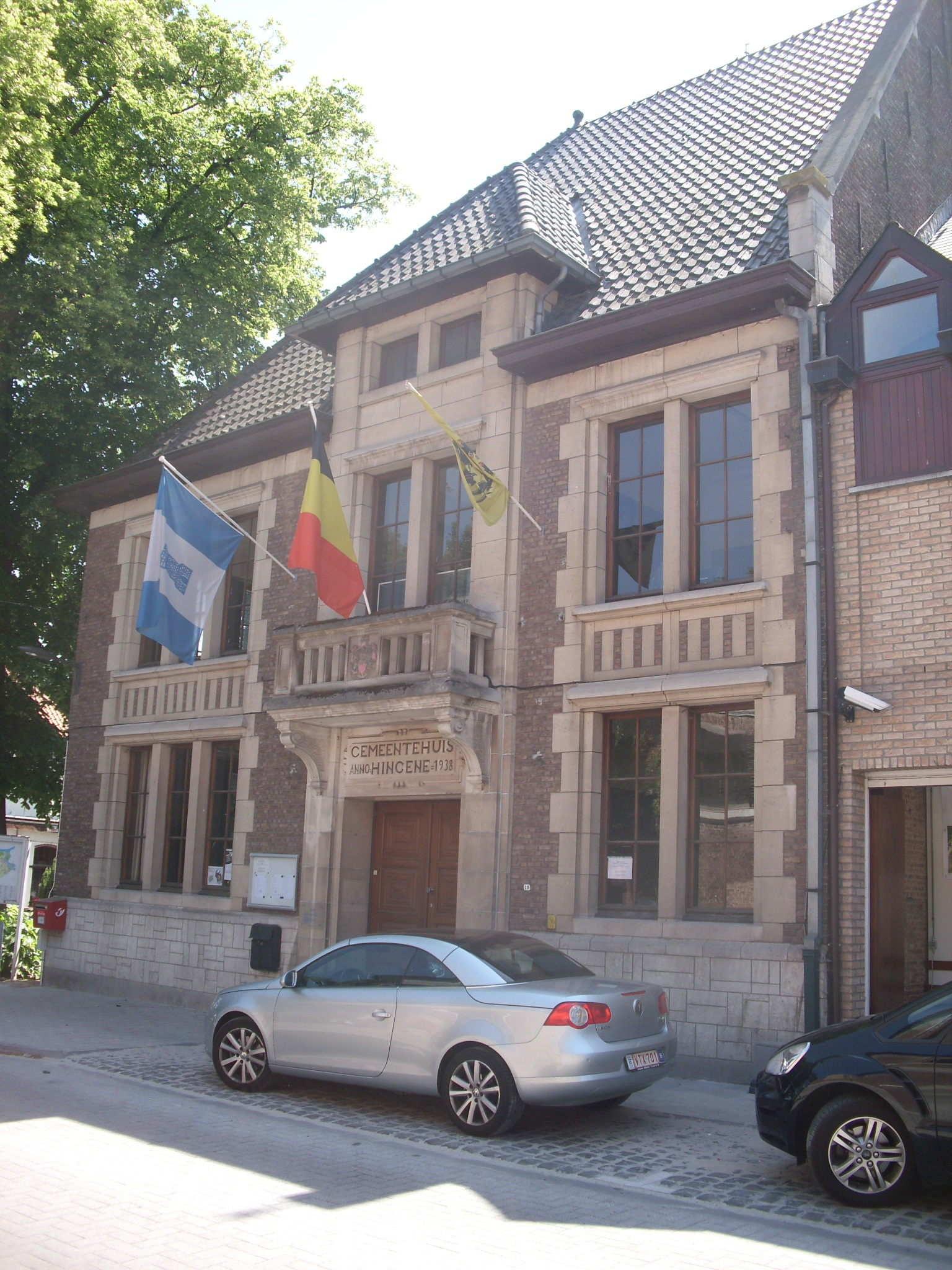 Gemeentehuis van Hingene - Wolfgang d'Urselstraat - thans deelgemeente van Bornem - Provincie Antwerpen - België